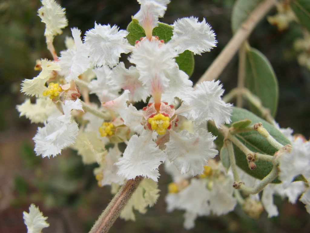 Banisteriopsis campestris - MALPIGHIACEAE Parque Nacional de Brasília - Distrito Federal - Brasil.